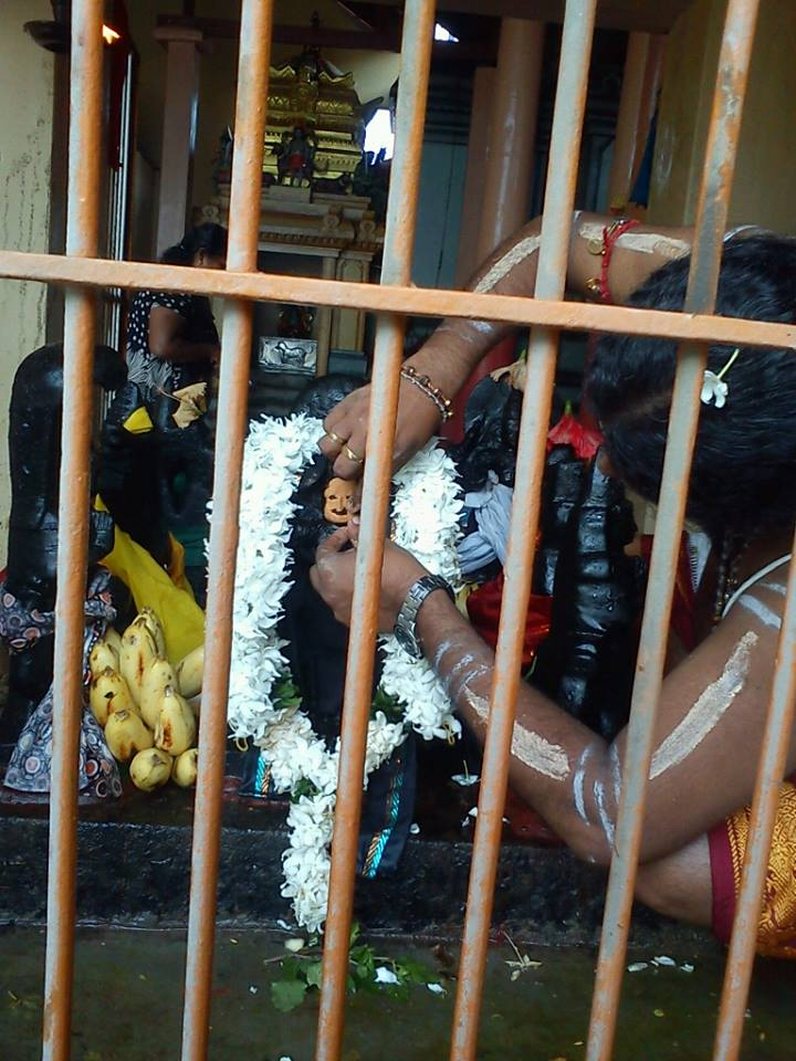 நவக்கிரகம் சந்நிதி